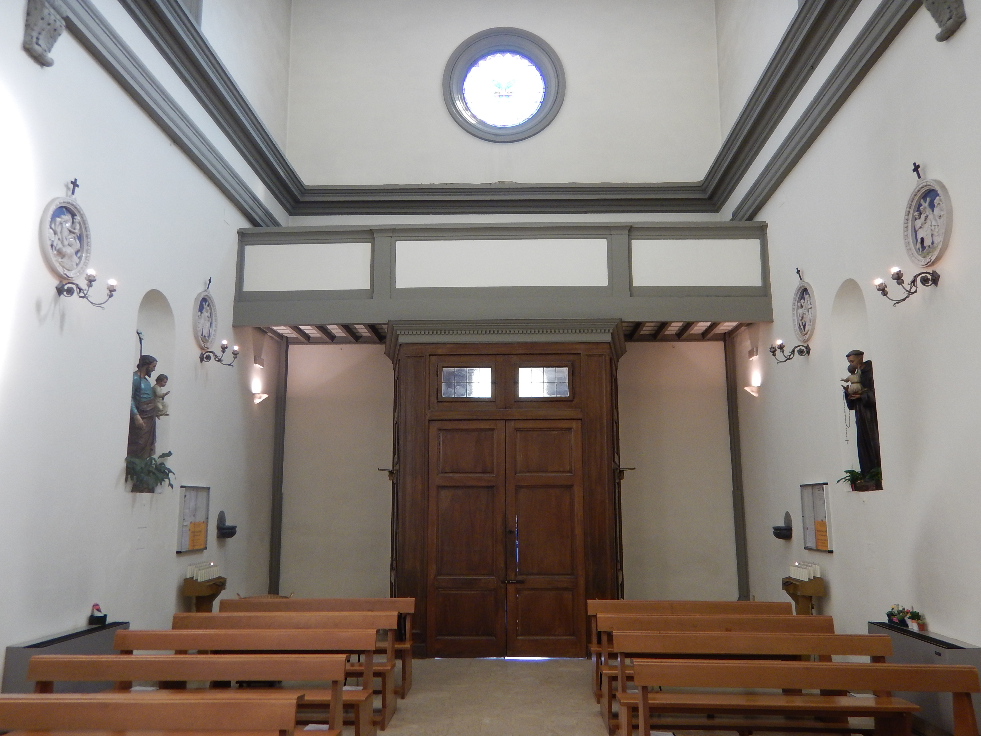 Controporta e cantoria della Chiesa di San Quirico a Legnaia